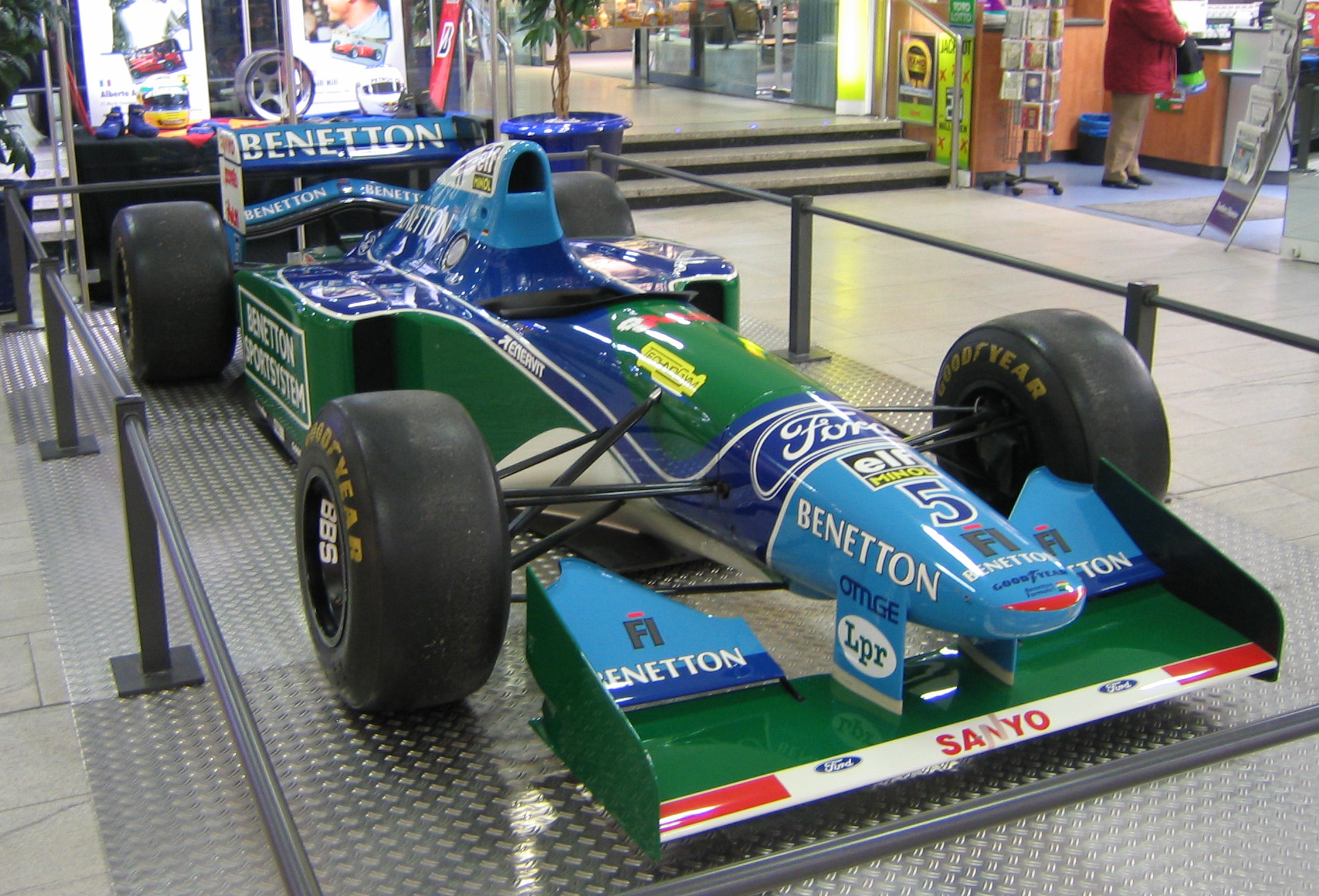 Benetton B194 Saison 1994 Ford V 8 Motor ca. 730 PS Leistung 350 km/h Topspeed 650kg (inkl. Fahrer) gefahren von Michael Schumacher